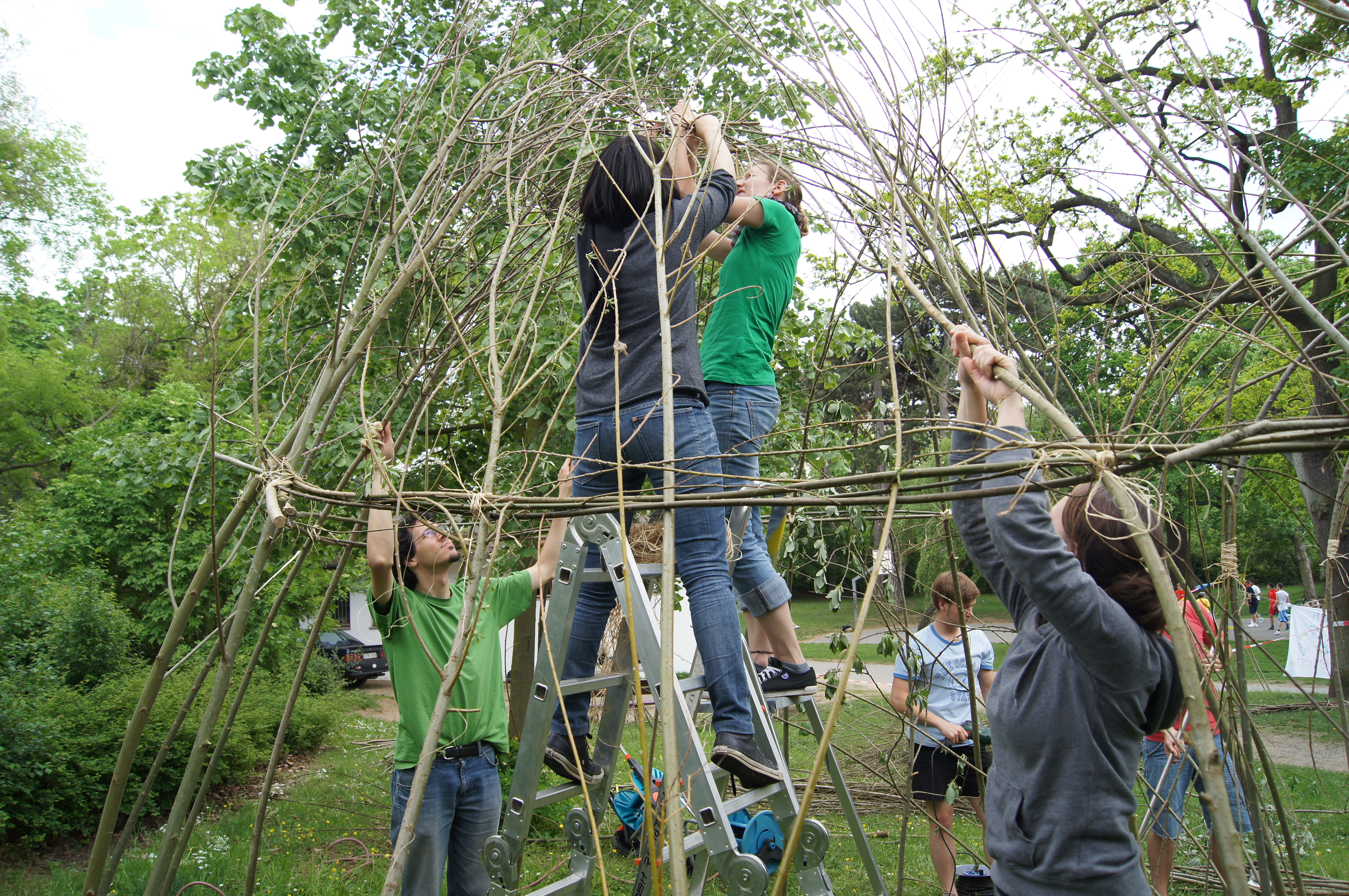 Arbeitsgruppe: Errichtung einer Weidenhütte